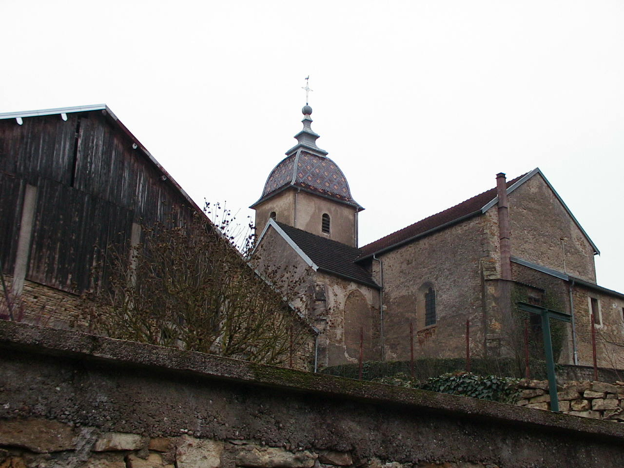 Clocher de l'église de Conflandey (Haute-Saône), vu depuis le bord de la Saône